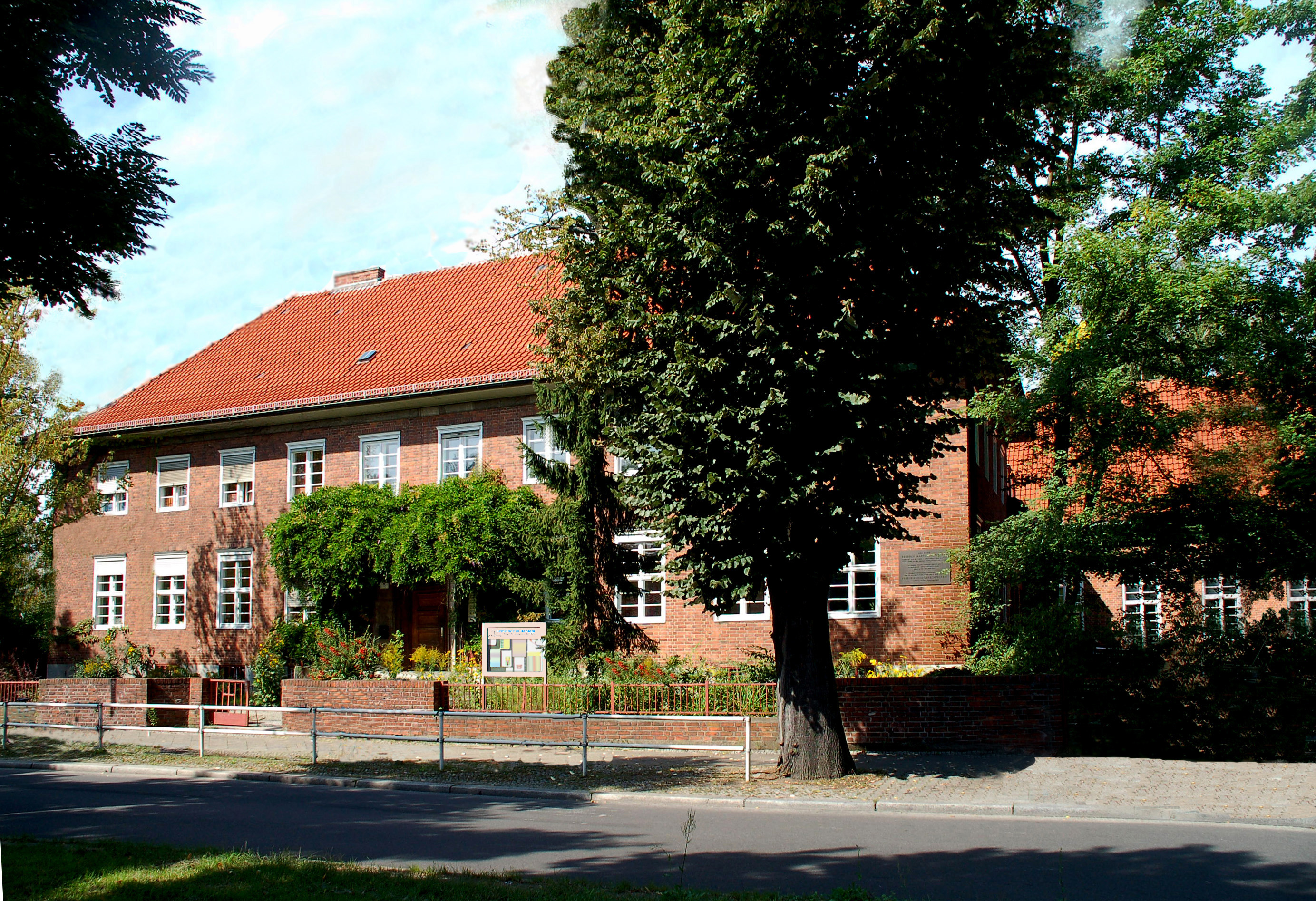 image: Parish Hall, Ev.Kirchengemeinde Dahlem, Berlin, Germany, 2007 / Place of Remembrance “Bekennende Kirche”, / Gemeindehaus, Ev.Kirchengemeinde Dahlem, Berlin, Germany, 2007, Erinnerungsort „Bekennende Kirche“. Image: image produced by Berkan, 2007, picture shows: Parish Hall, Ev.Kirchengemeinde Dahlem, Berlin, Aug.2007 / Place of Remembrance “Bekennende Kirche”